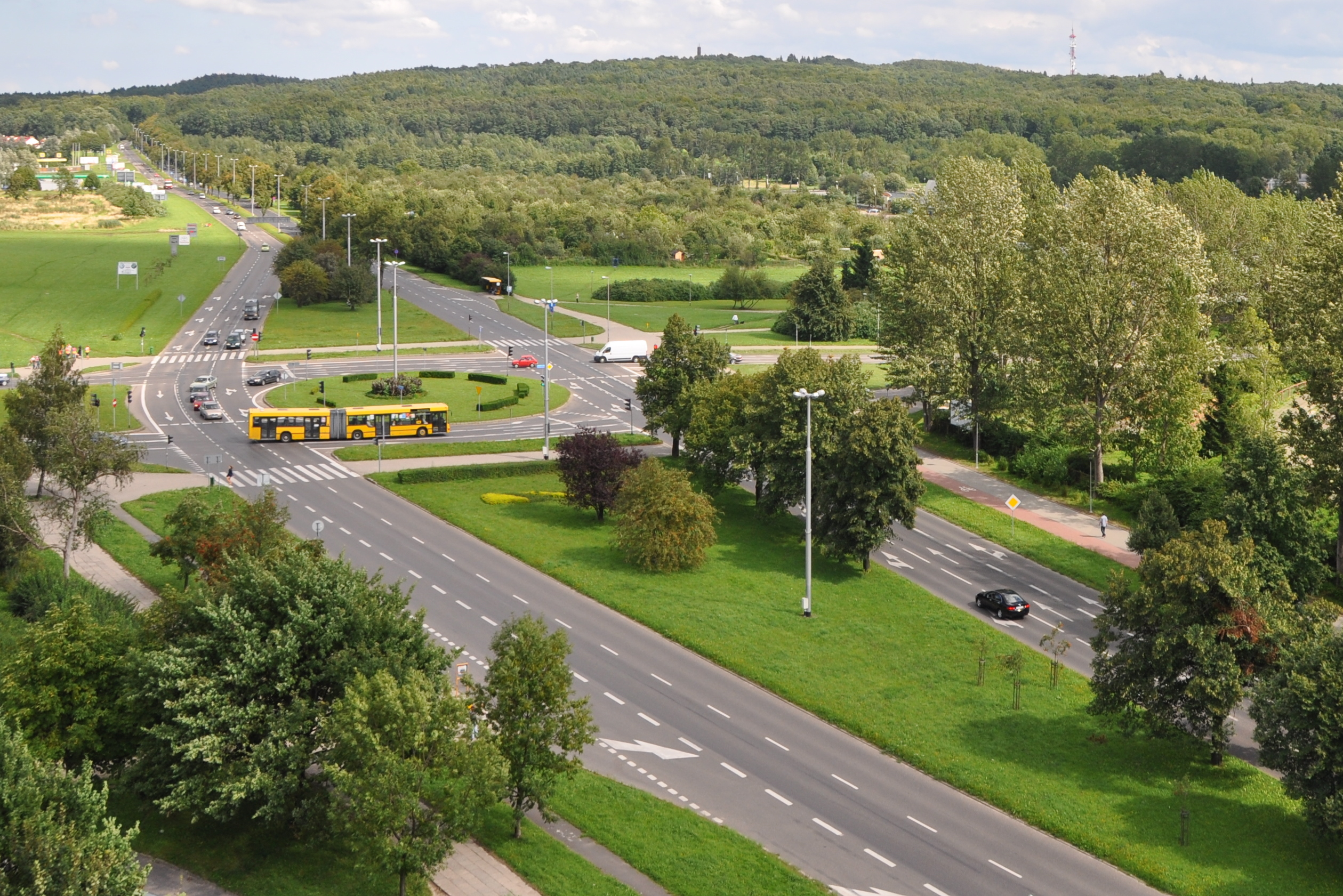 Droga krajowa nr 6 w Koszalinie (ul. Juliana Fałata, rondo, ul. Gdańska) – ujęcie z bloku mieszkalnego Fałata 15 (z 10. piętra)